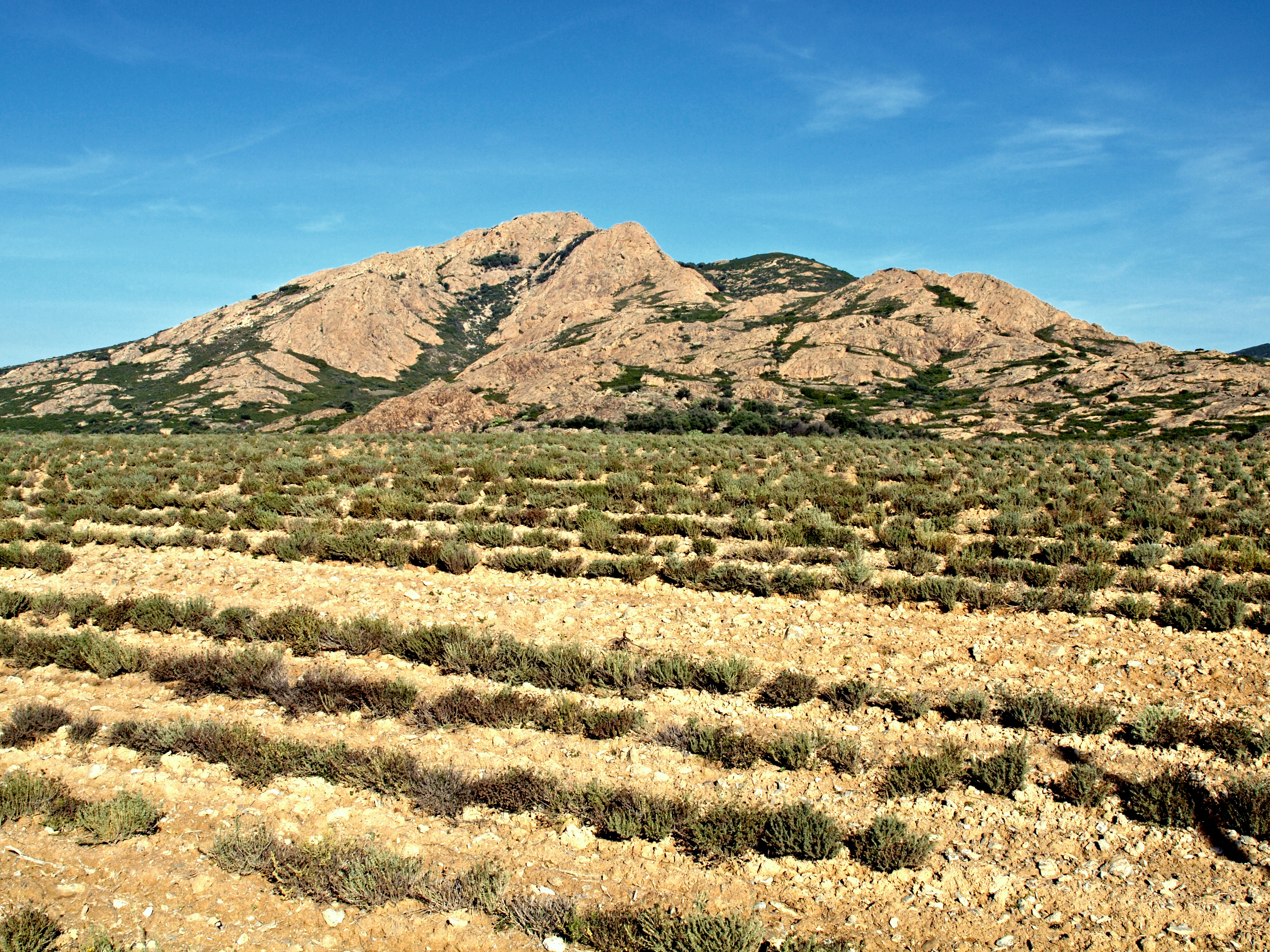 Palasca (Corsica) - Champ d'immortelles d'Italie